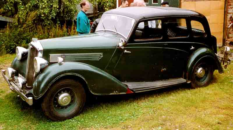 Wolseley 25/6 4-Door Saloon 1937